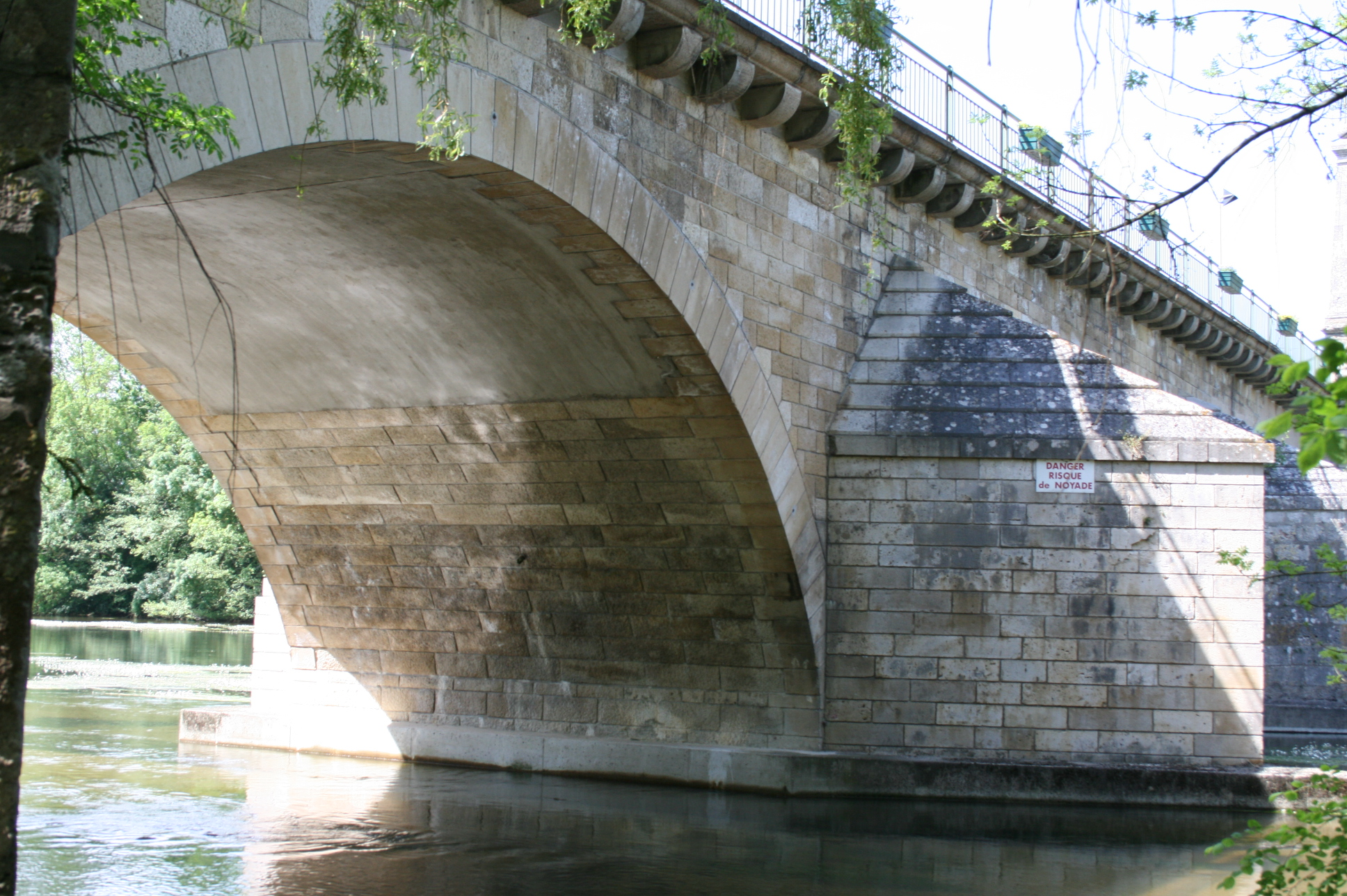 Pont Saint-Nicolas sur le Loiret – Communes de Saint-Pryvé-Saint-Mesmin et Saint-Hilaire-Saint-Mesmin – Département du Loiret – France – Pont en maçonnerie - Vue amont - Arche 2.